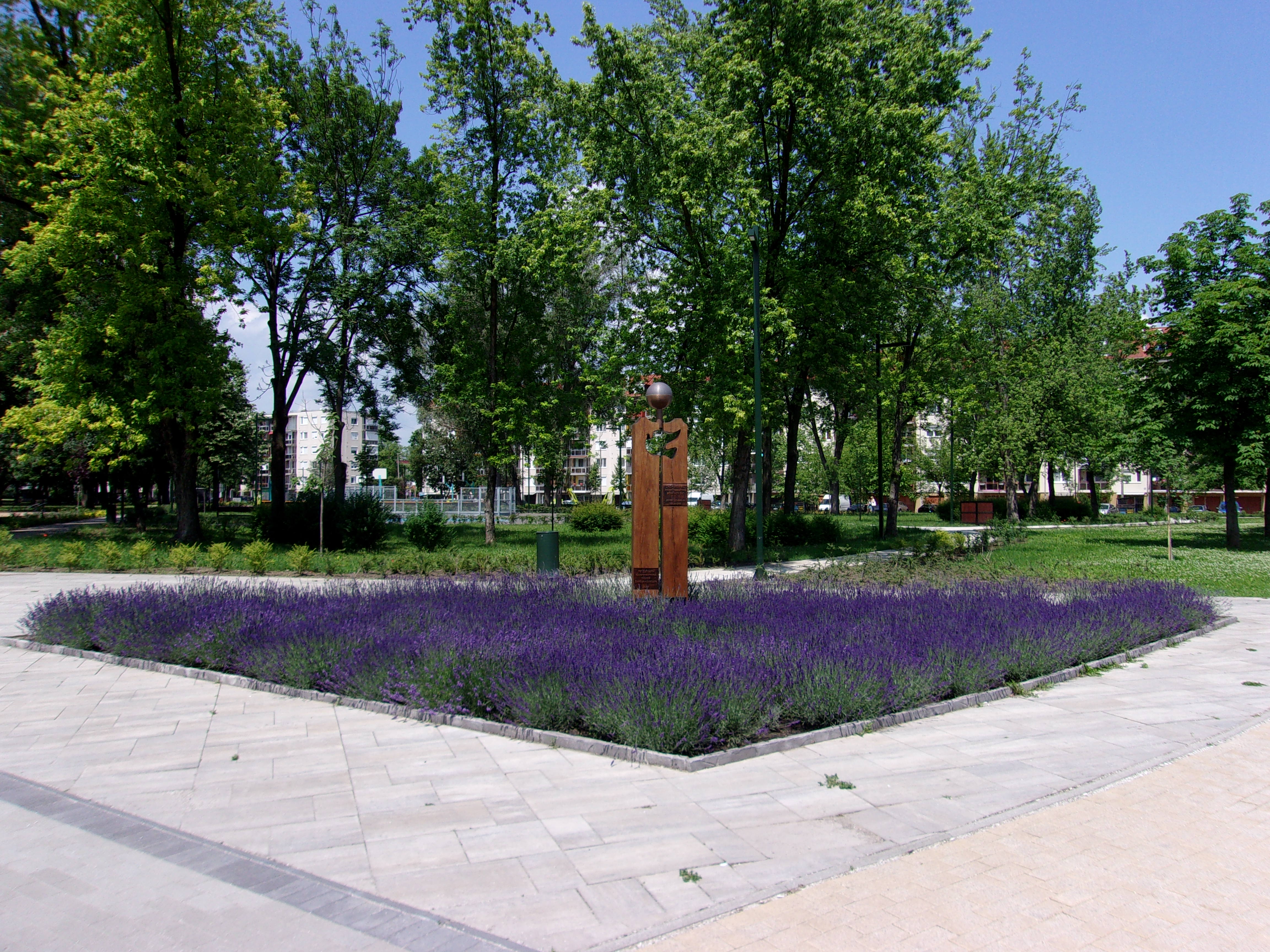 John Lennon-emlékoszlop, Kazincbarcika